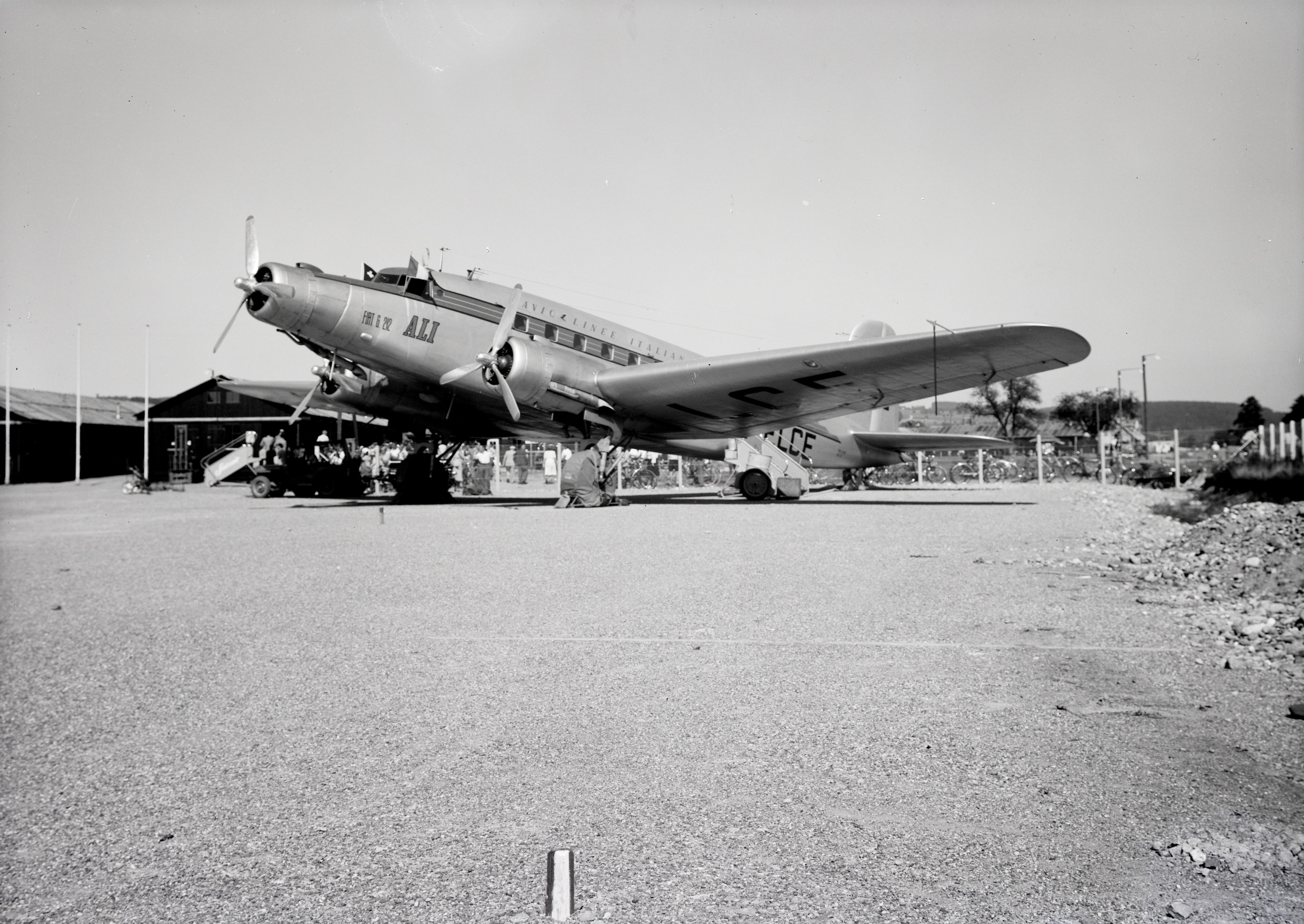 Baujahr 1947, am 4.5.1949 zerstört durch crash in Torino